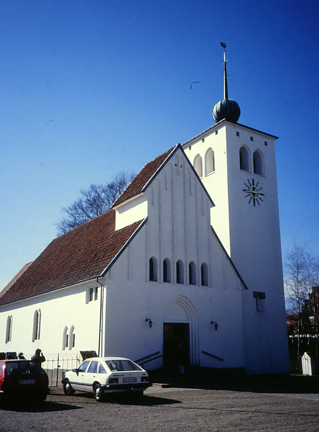 Kirken i Ans, april 1997.